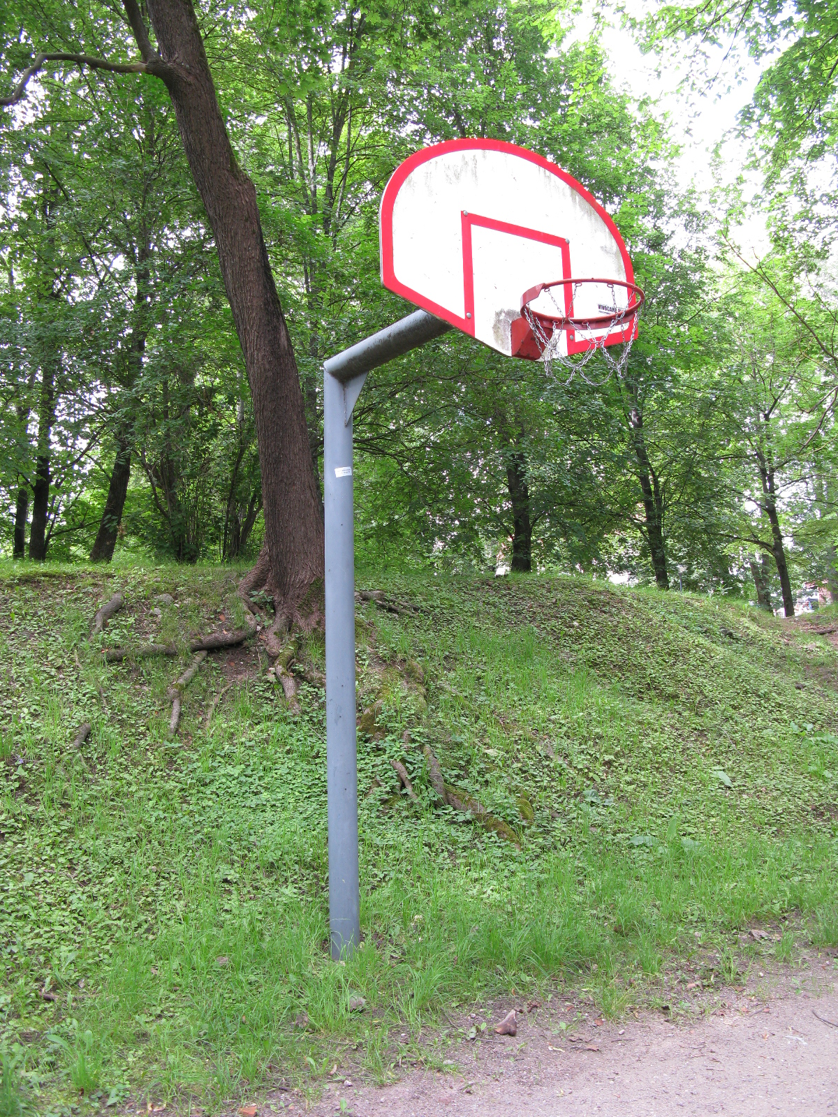 Korvpallirõngas Tartus Toomemäel, 20. juuli 2012. Foto: Oop.